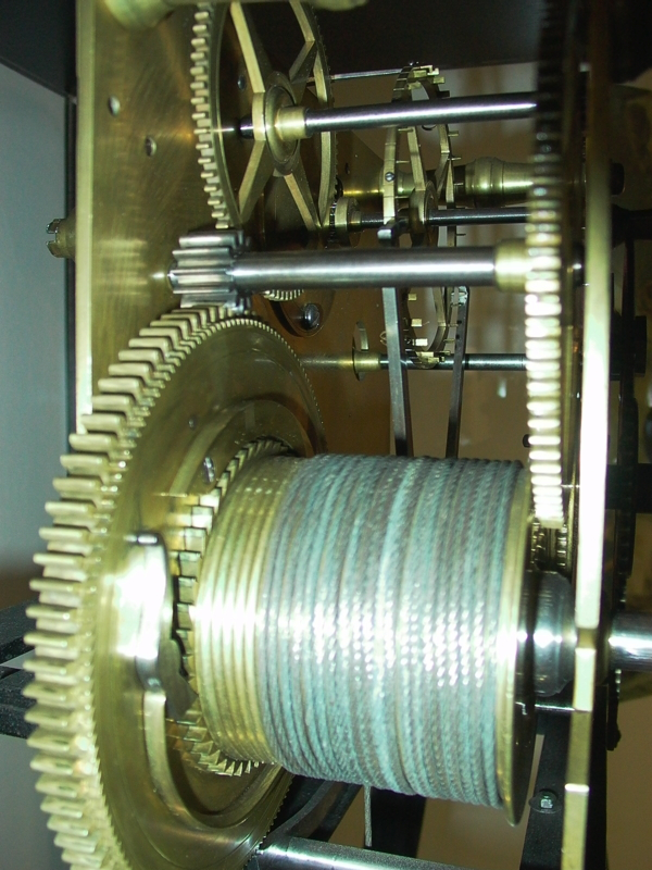 Akademieuhr Christian Möllinger Blick ins Räderwerk